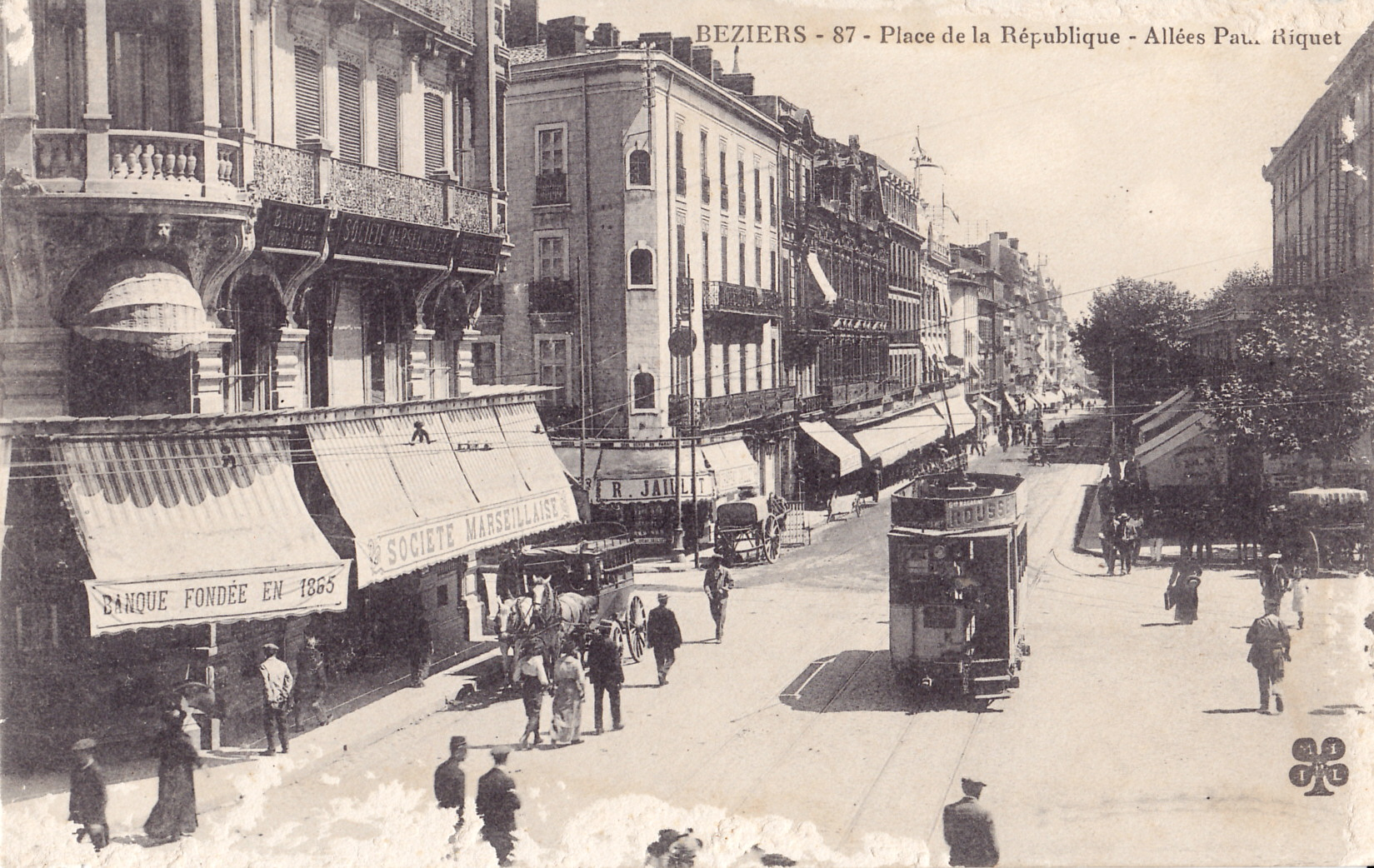 Carte postale ancienne éditée parMTIL, n°87:Béziers - Place de la République - Allées Paul Riquet